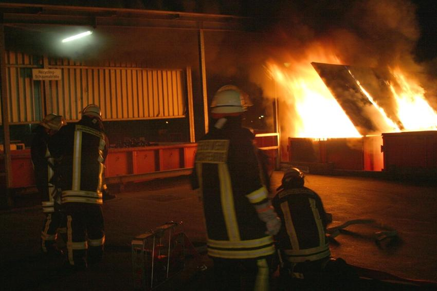 Müllcontainerbrand in Aschaffenburg